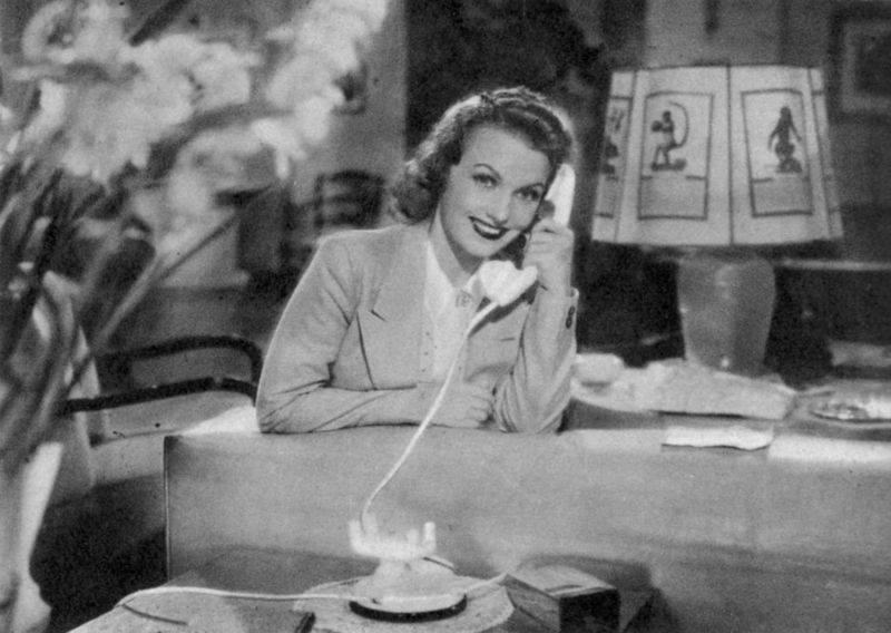 Assia Noris in una foto di scena del film La casa del peccato, regia di Max Neufeld (1938).